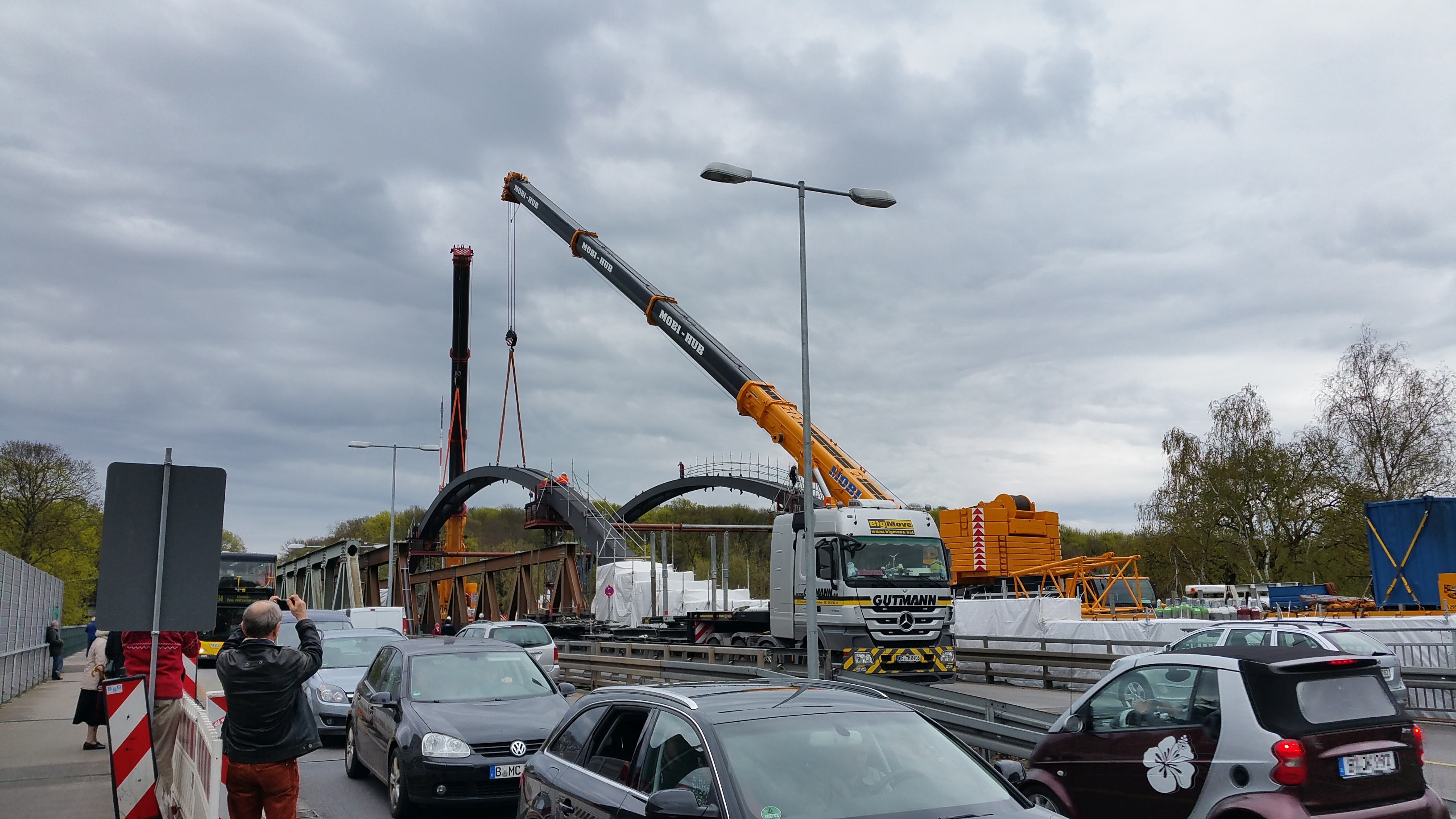 Neue Freybrücke Montage 16-04-2016, Montage nördlicher Bogen